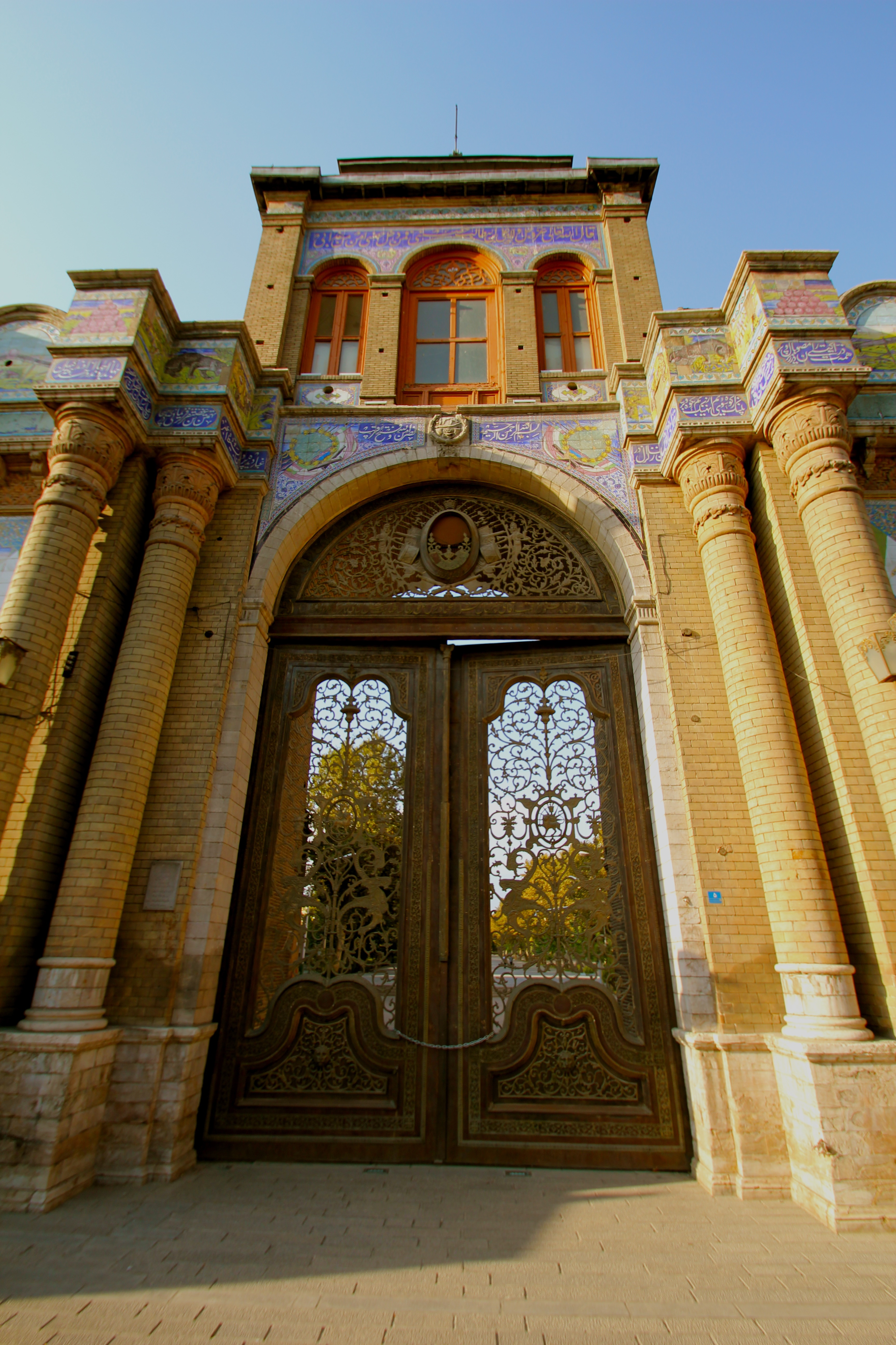 Bagh-Melli, Tehran